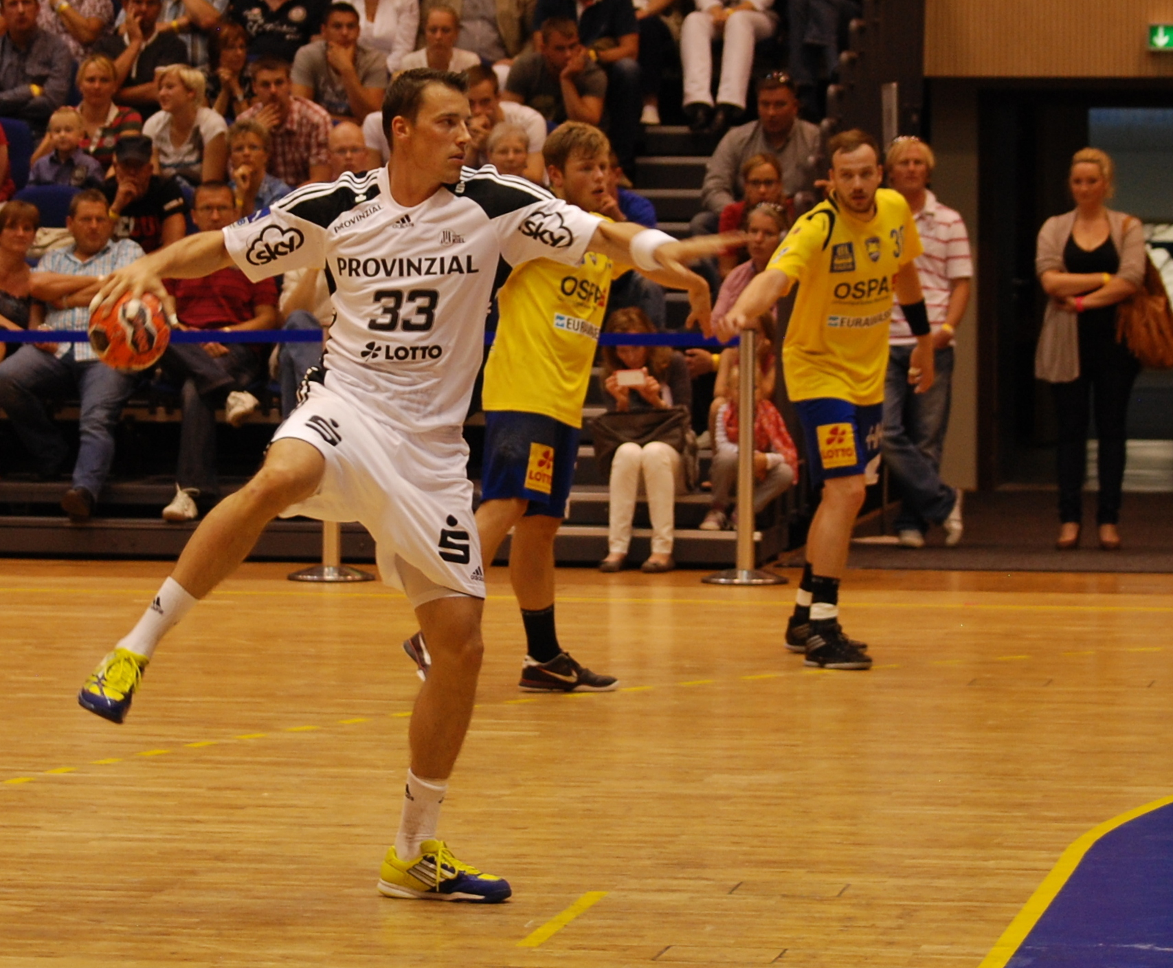 Deutscher Nationalspieler und Bundesligaspieler des THW Kiel